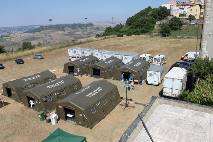 Simulazione primo soccorso in caso di incidente stradale durante la celebrazione del decennale dell'associazione Misericordia Grassano 2001-2011.